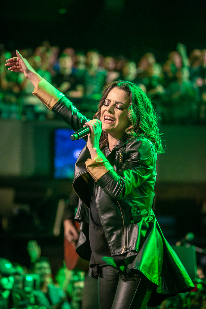 Ana Paula Valadão DT19